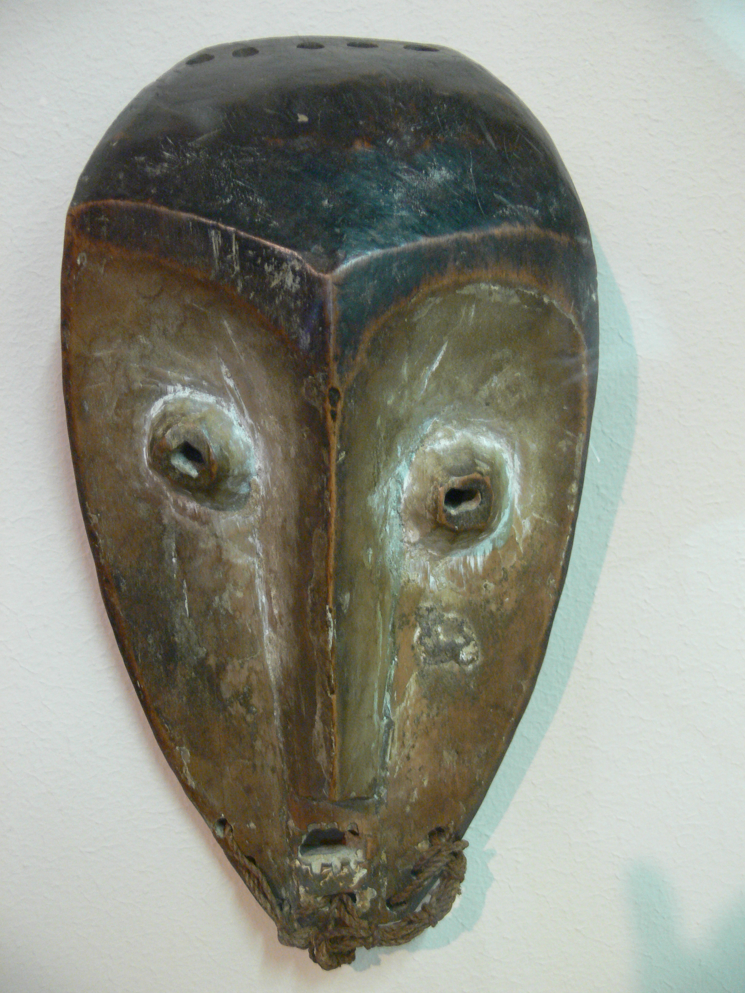 Stuttgart, Linden-Museum Gesichtsmaske als Symbol der Verbindung der Ahnen zu den Lebenden, Bwami-Bund, Lega (DR Kongo)